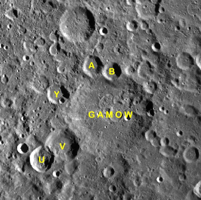 Cráter lunar Gamow. Cráteres satélite. (Imagen LRO)